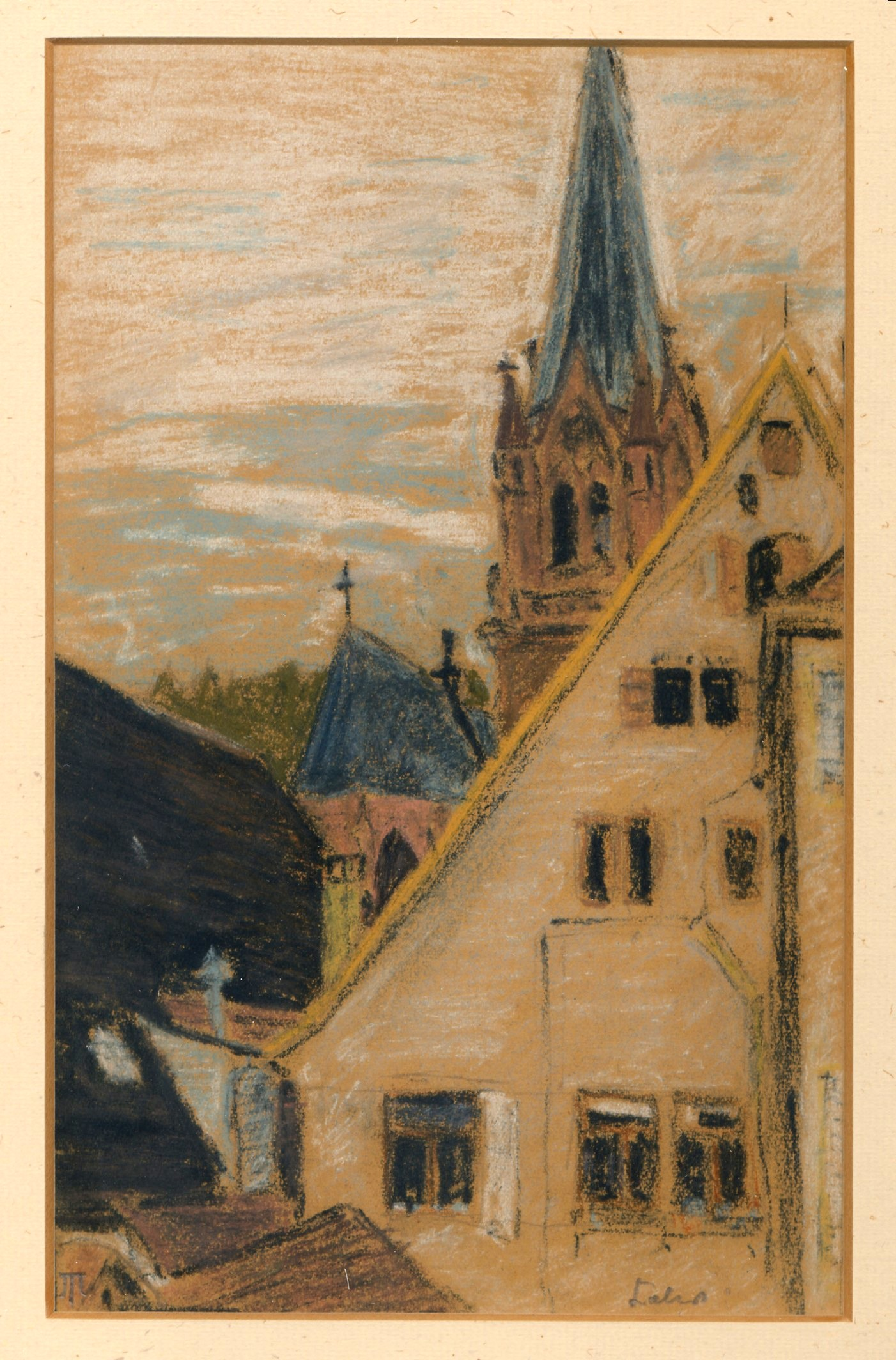 Farbige Kreidezeichnung von Adolf Mannschreck, angefertigt im August 1919 als Blick von einem oberen Westfenster des Kaffeehauses in Calw. Die Zeichnung zeigt den Kirchturm der Calwer Stadtkirche Peter und Paul, 1888 wiedererbaut.